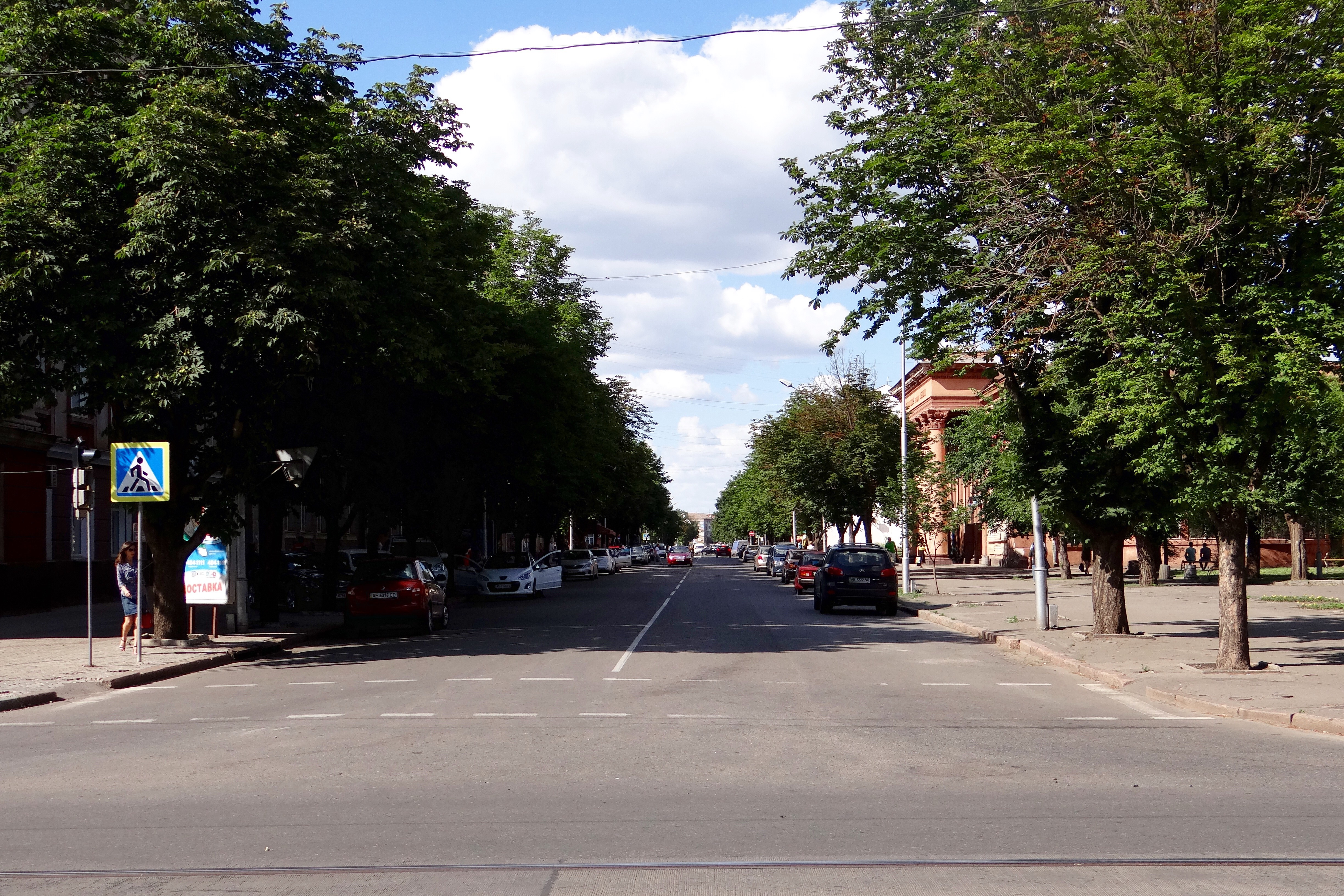 вул. Карла Маркса Кривий Ріг